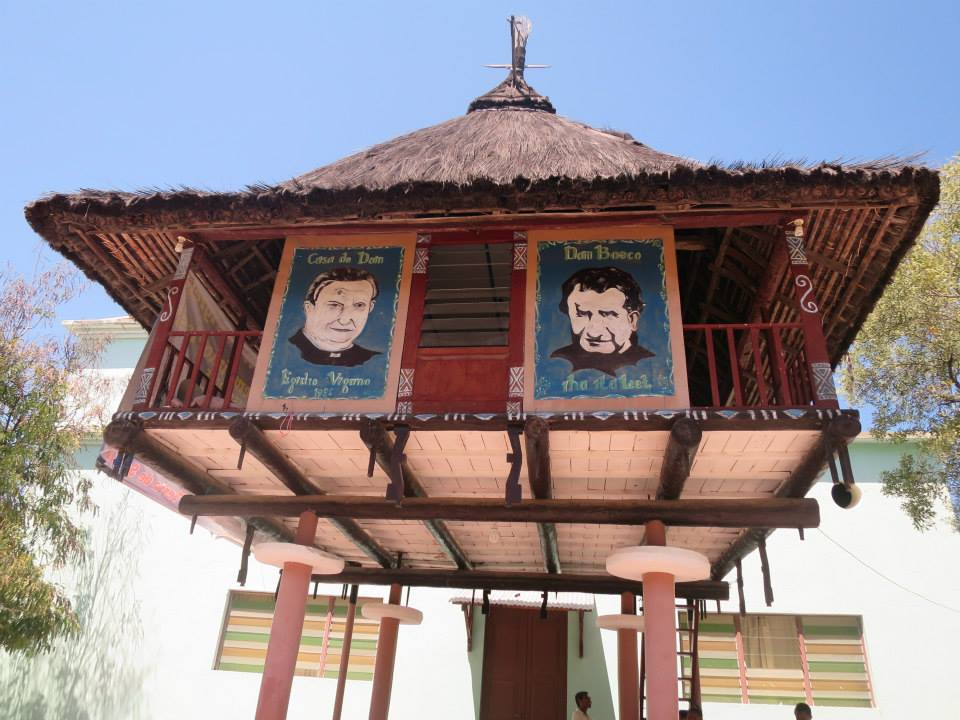 Igreja de S. João Bosco de Laga